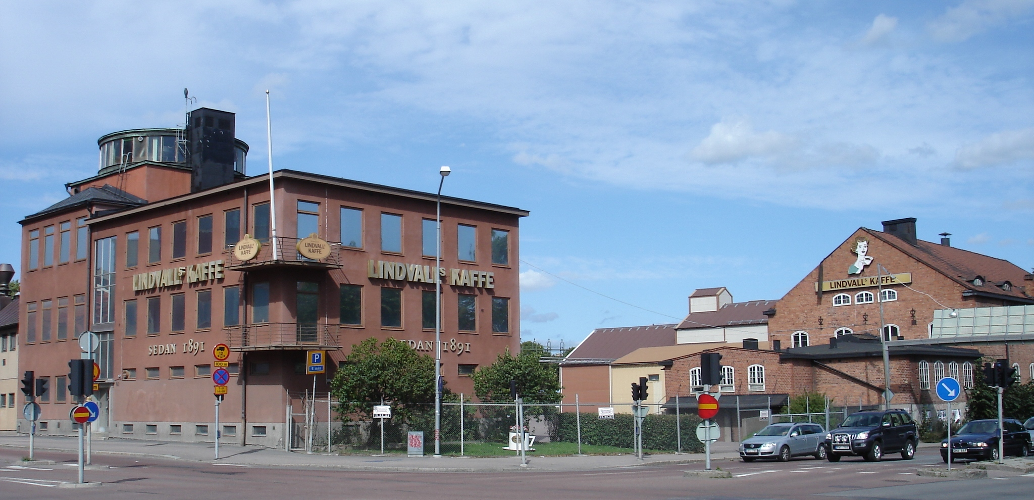 Lindvalls kafferosteri, Uppsala